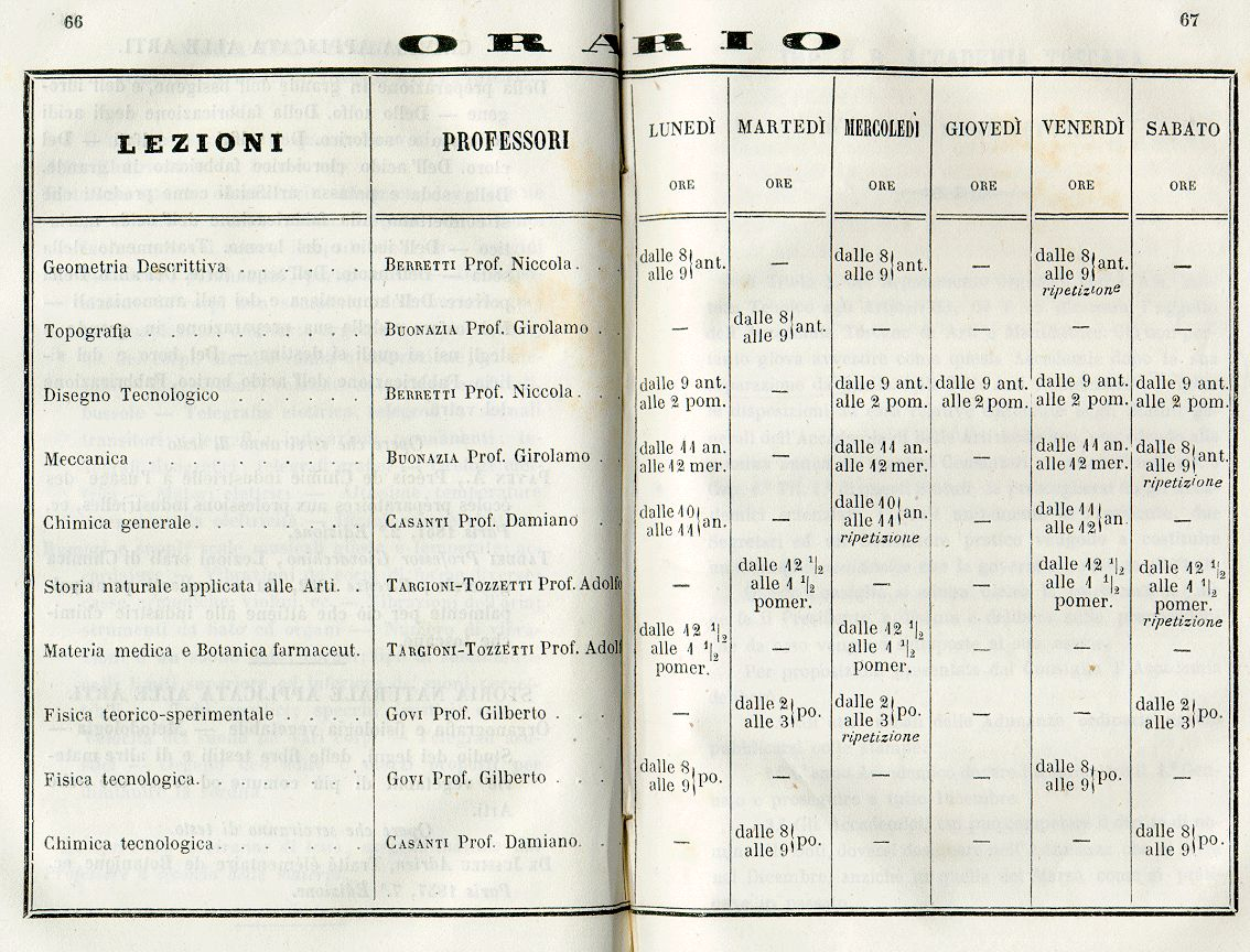 Orario settimanale delle lezioni dell'Istituto Regio Tecnico Toscano nell'anno 1857